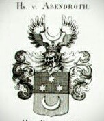 Wappen der Herren von Abendroth